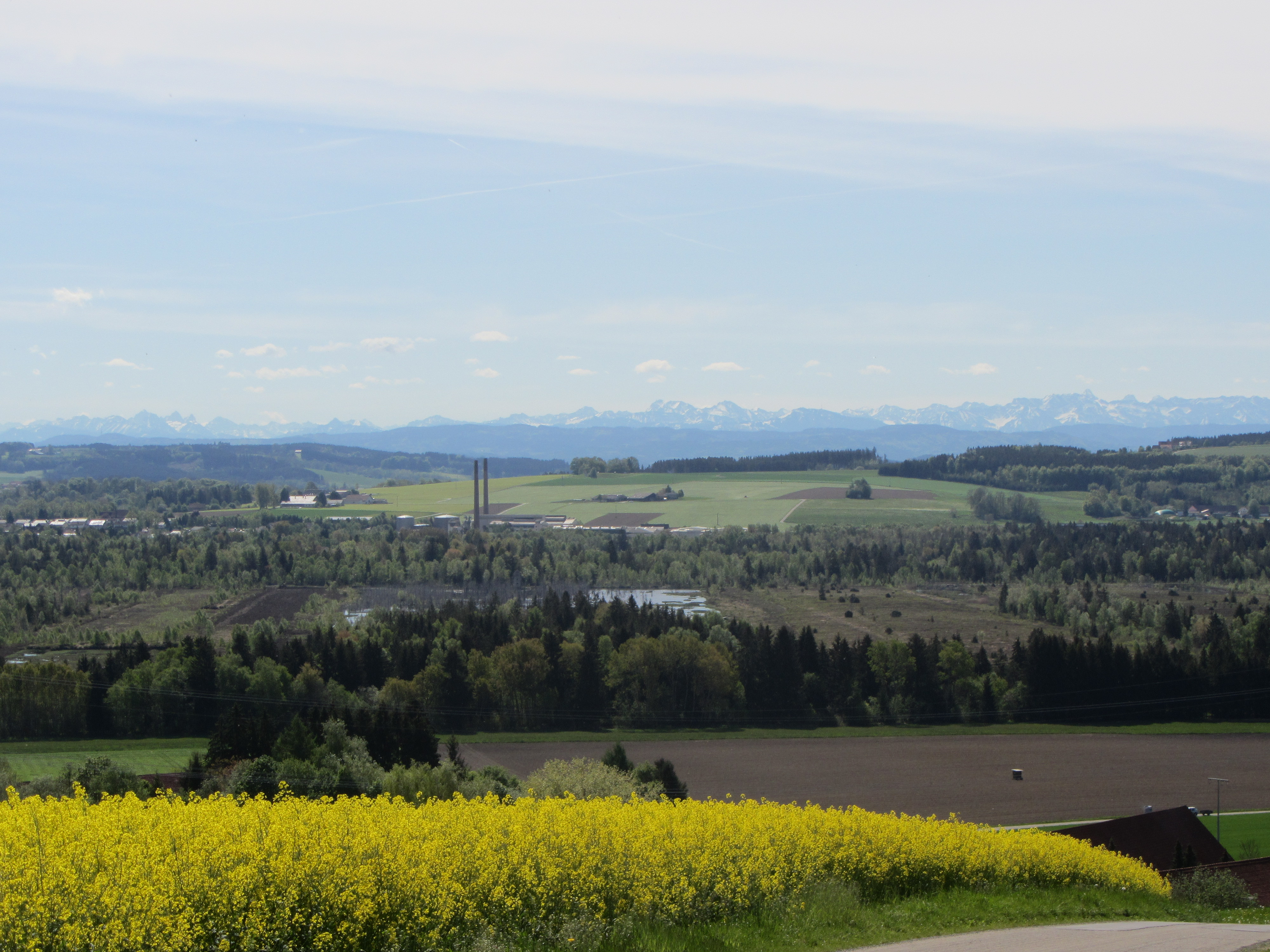 Grabener Höhe - Blick nach Süden auf die Alpen, Wurzacher Ried, Bad Wurzach und Oberland Glas